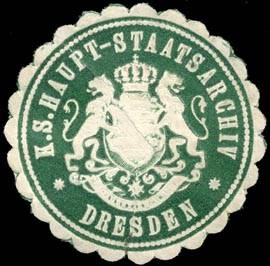 Sealing stamp Title: Königlich Sächsische Haupt - Staatsarchiv - Dresden Description: grün, weiß, geprägt Place: Dresden size: 3 cm